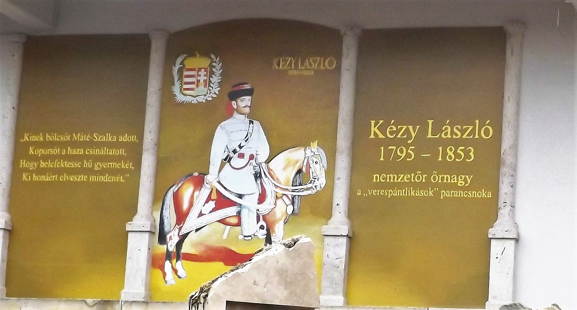 Kézy László emlékfala Mátészalkán